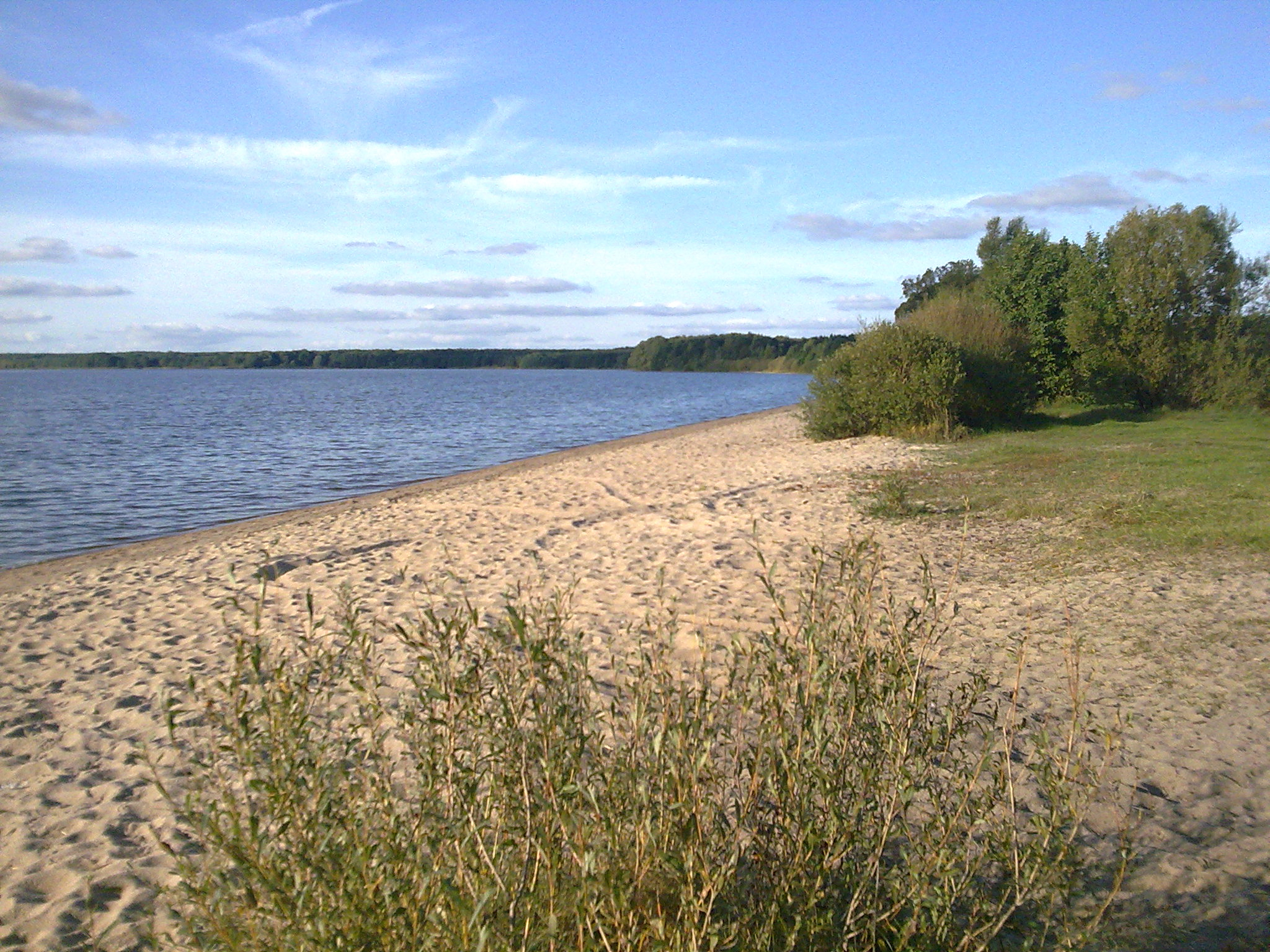 Plaża nad jeziorem Wielimie